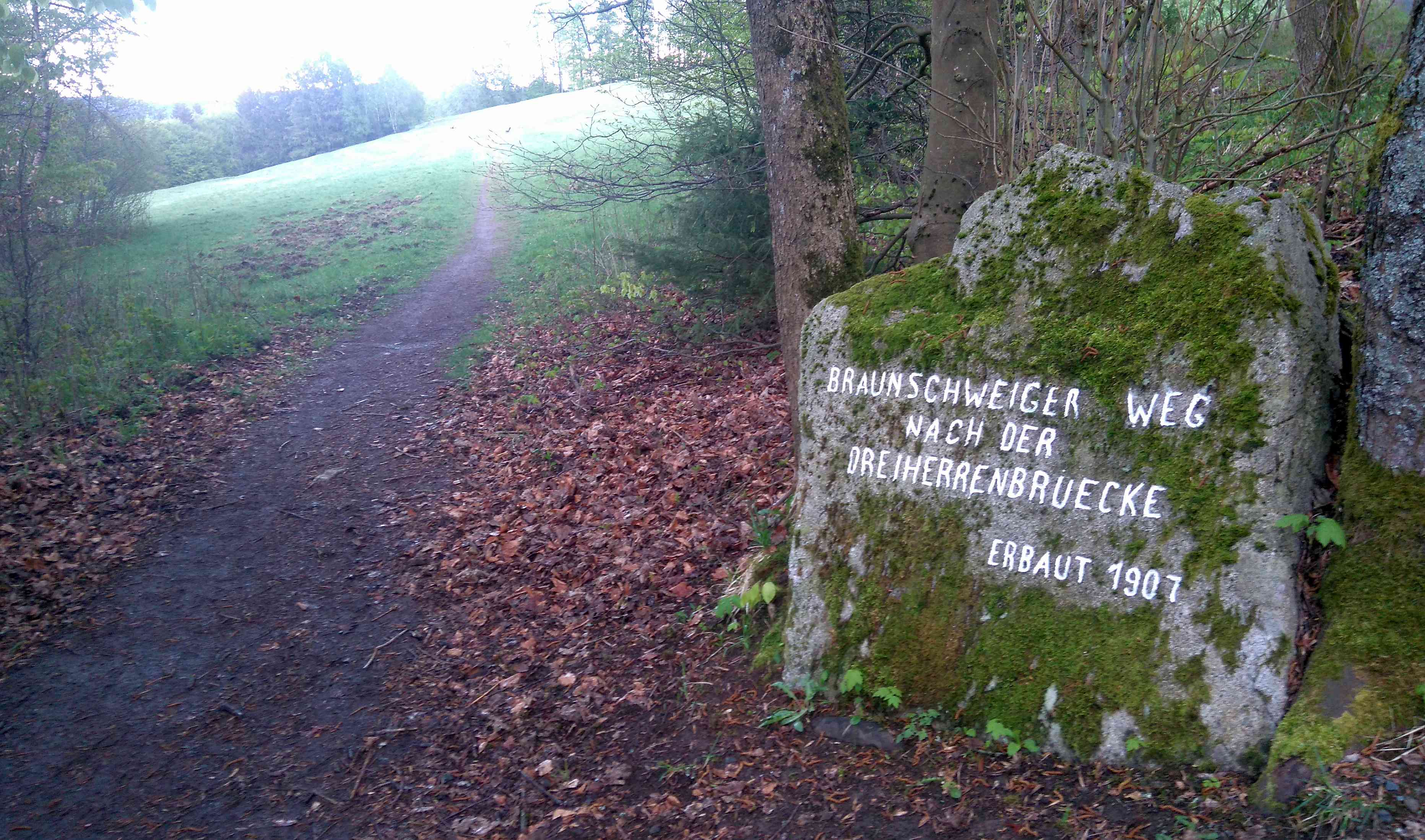 Braunschweiger Weg